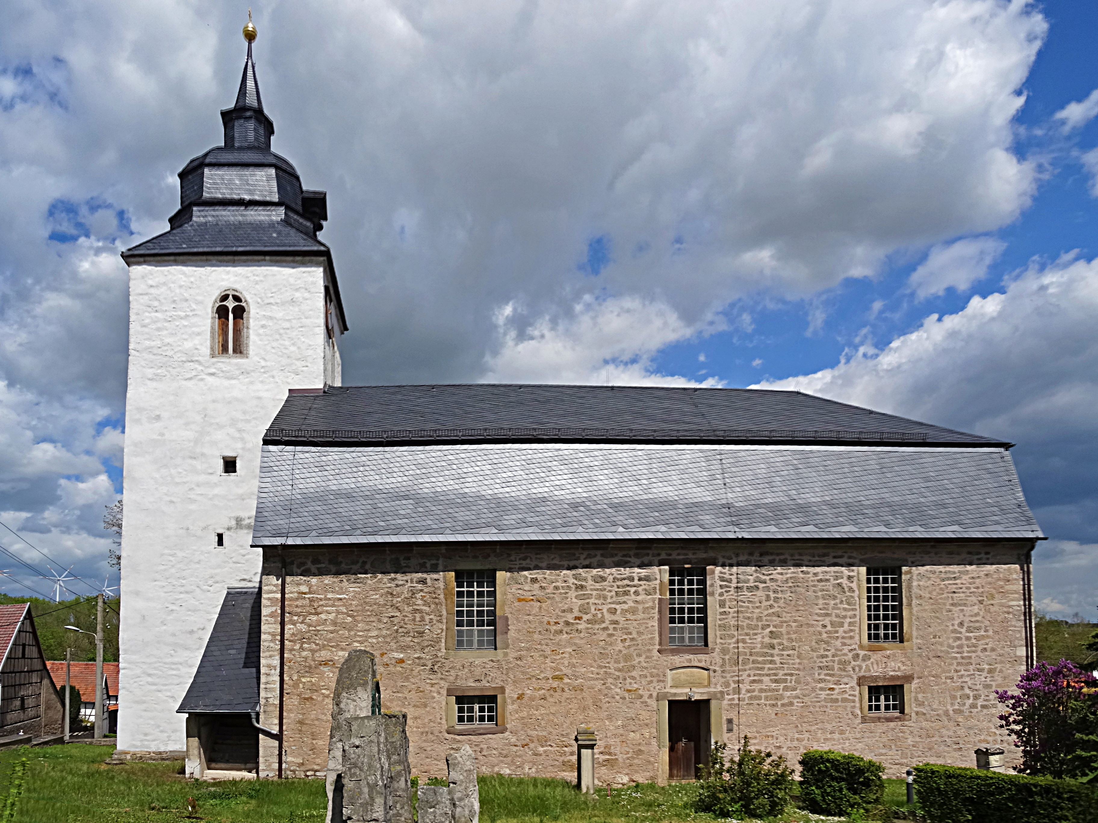 Dorfkirche St. Petri (Kutzleben) von Süden